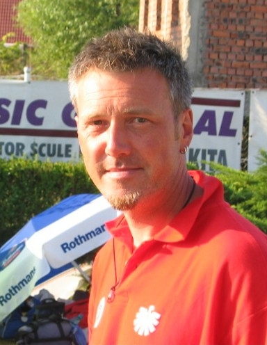 Europameisterschaft im Bahnengolf 2004 in Timisoara/Rumänien